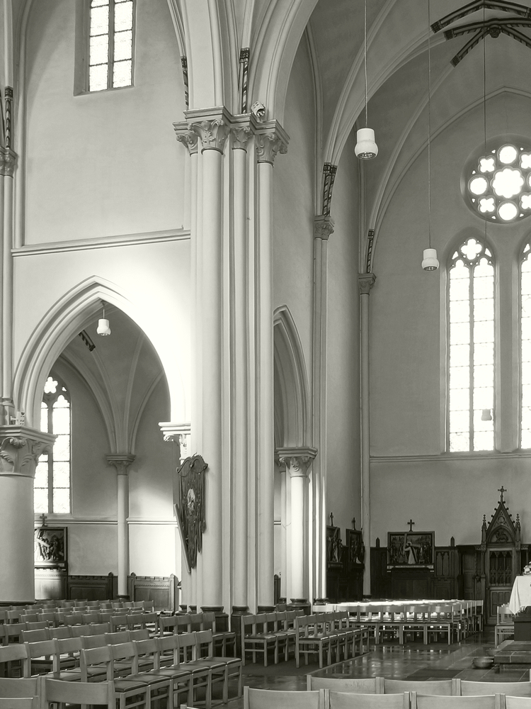 Sint-Willibrorduskerk (Merksplas) - Viering & Kruisbeuk